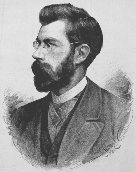 Josef Wünsch (1842-1907), středoškolský profesor, cestovatel, kartograf